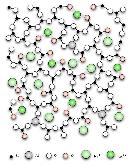 Glass structure 2d